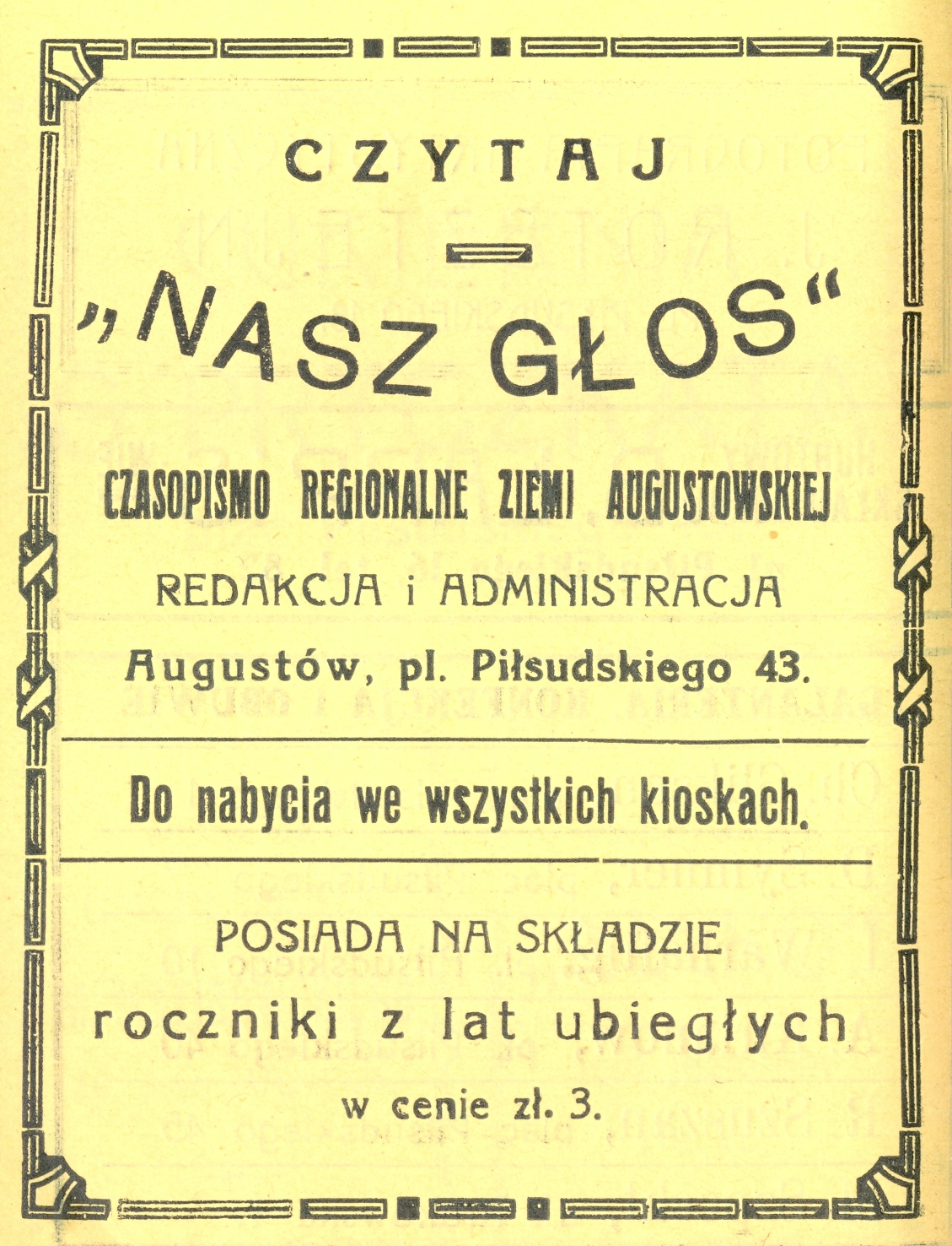 Reklama czasopisma "Nasz Głos" opublikowana w przewodniku "Pojezierze suwalsko-augustowskie" Augustów 1937